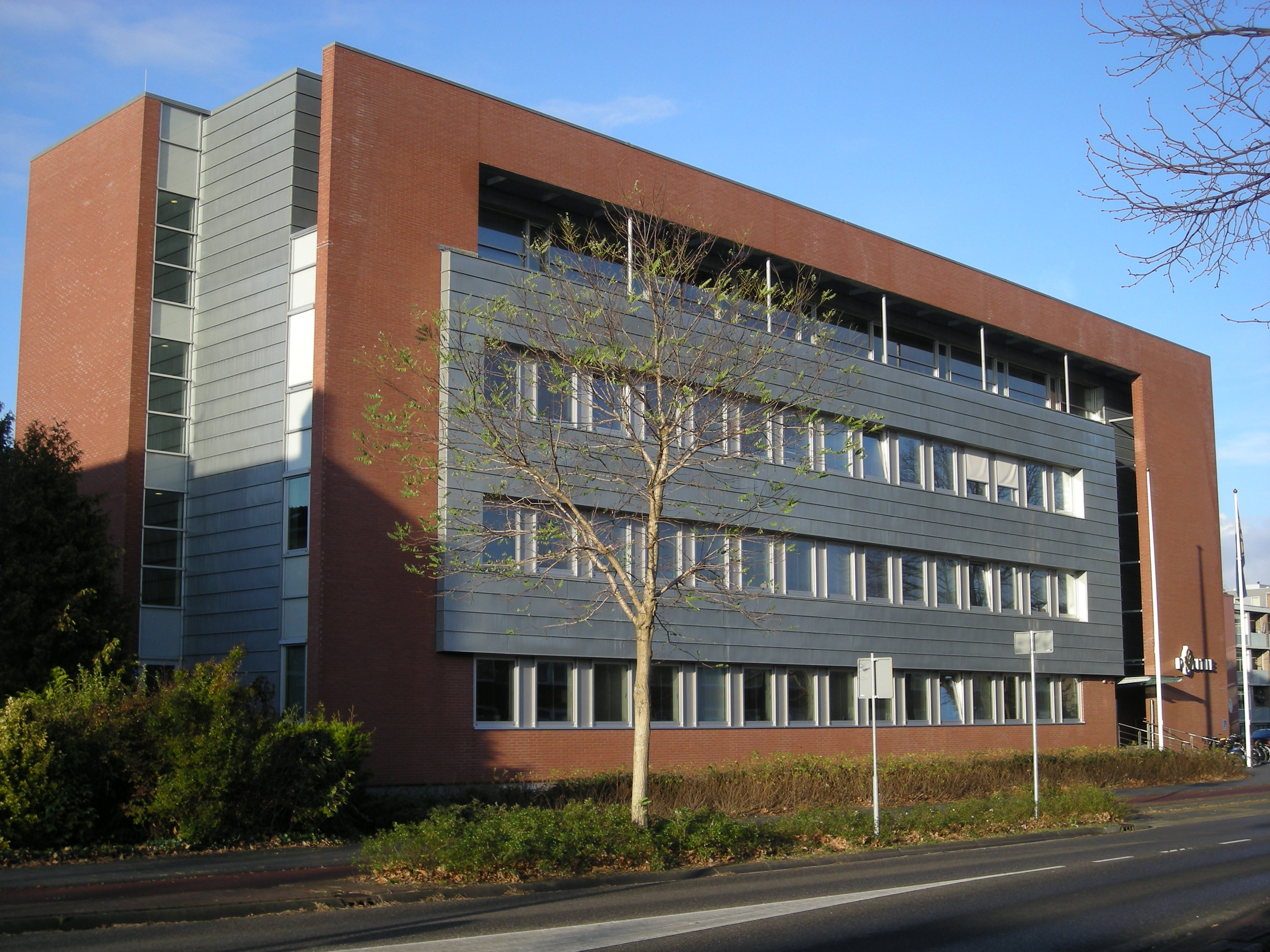 Politiebureau, Police station, in Heerenveen